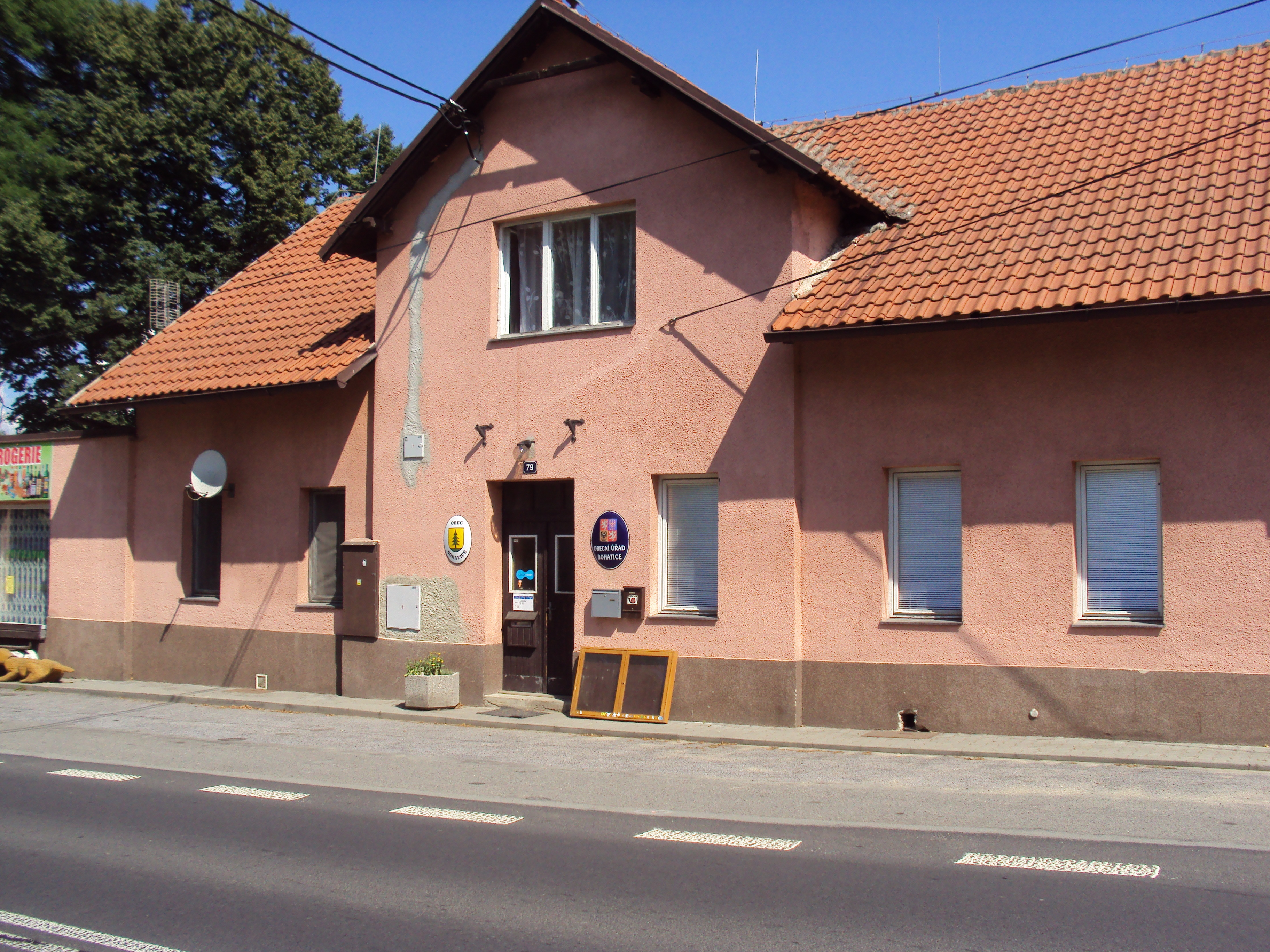 Obecní úřad Bohatice je u hlavní silnice uprostřed obce